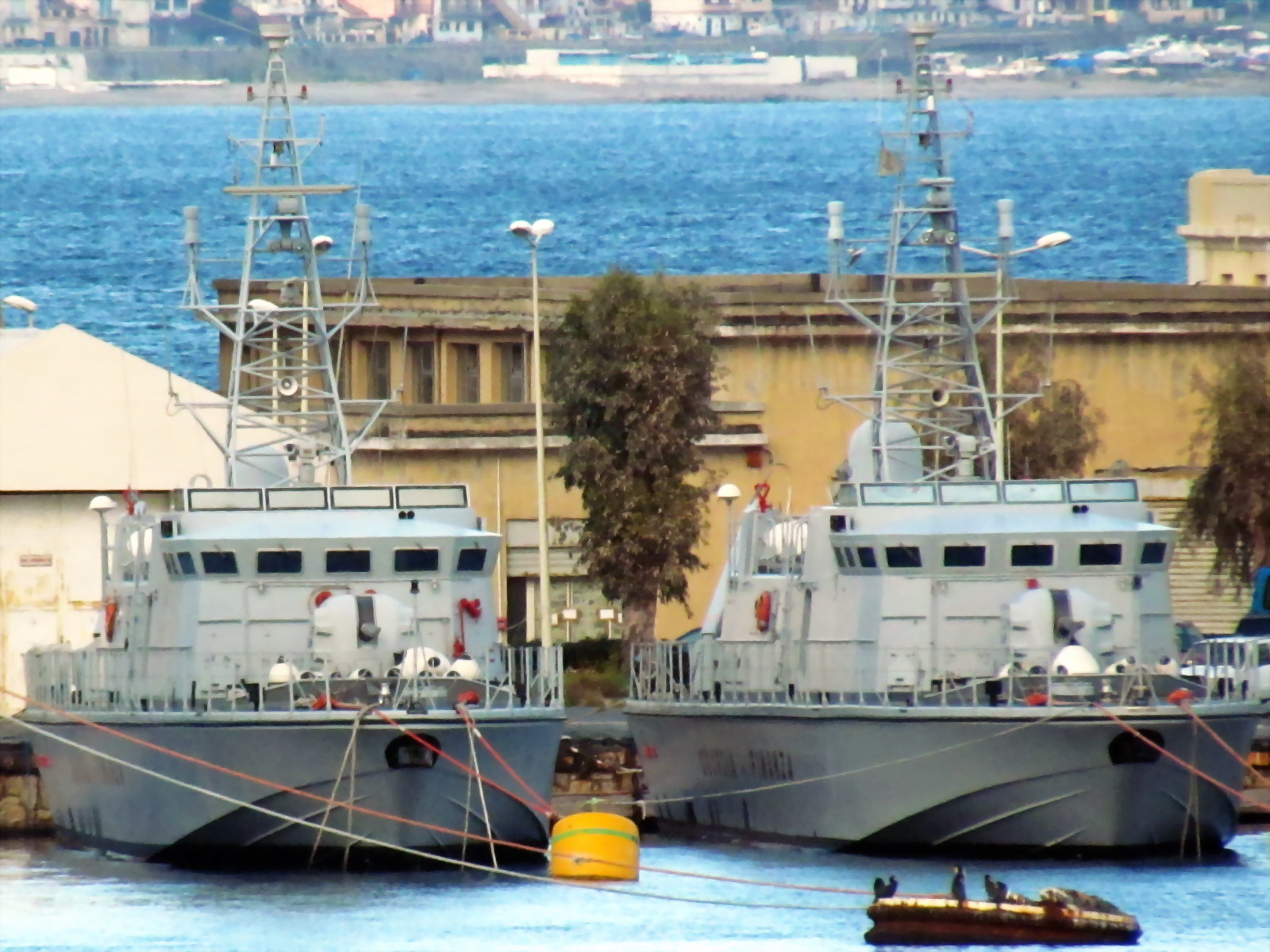 Pattugliatori classe Mazzei ormeggiati a Messina